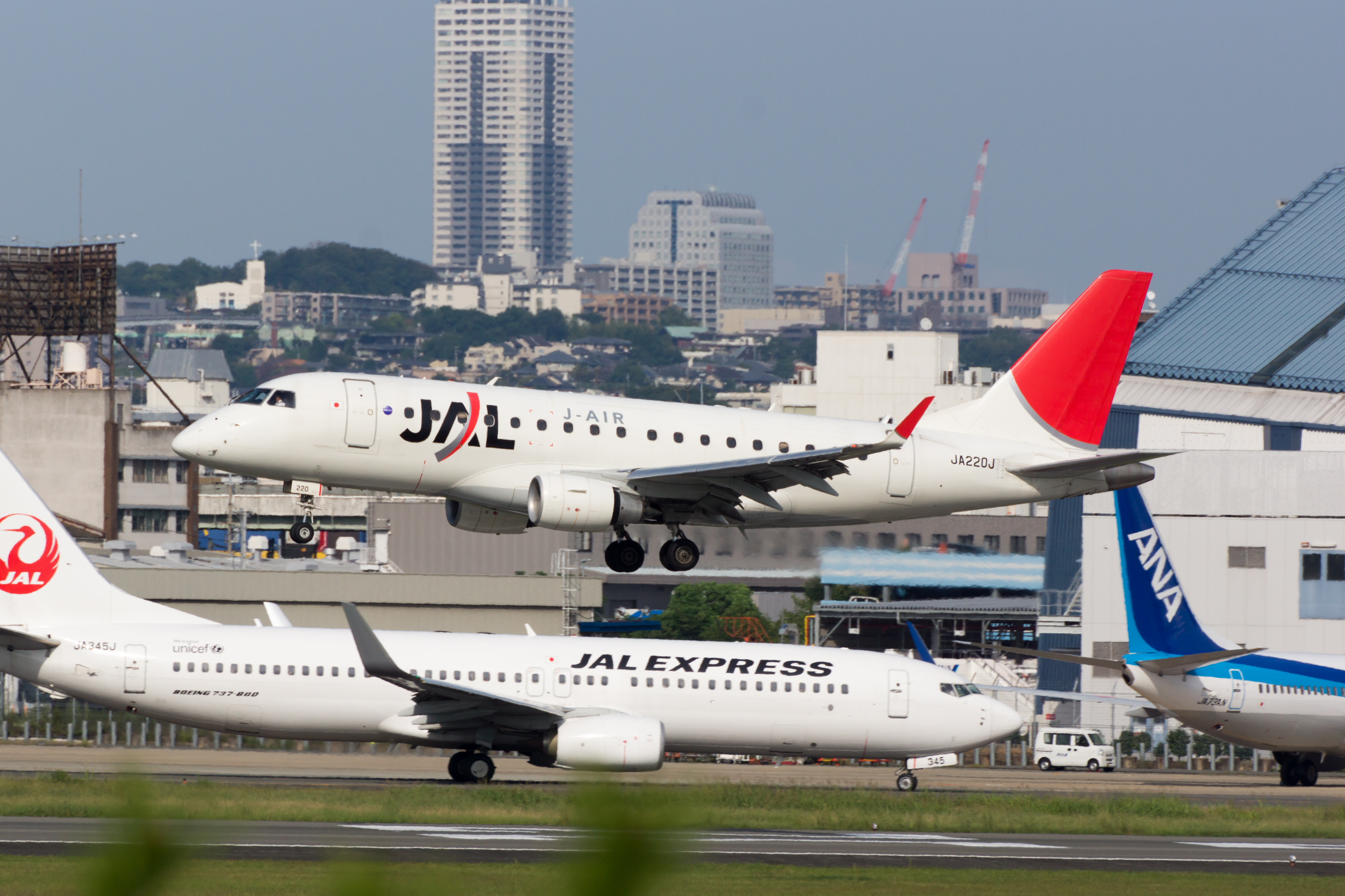 J-Air / ジェイ・エア Embraer ERJ-170-100 (ERJ-170STD) JA220J JL2124, Arrived from Hakodate Osaka Itami Int'l Airport